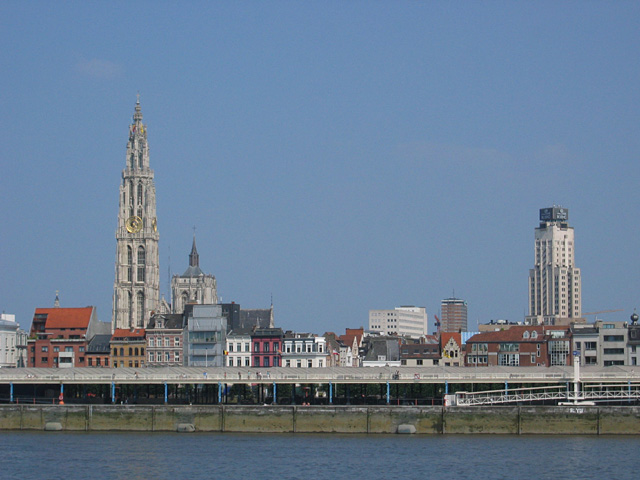 Skyline van Antwerpen met de Onze-Lieve-Vrouwekathedraal (links) en de Boerentoren (rechts)